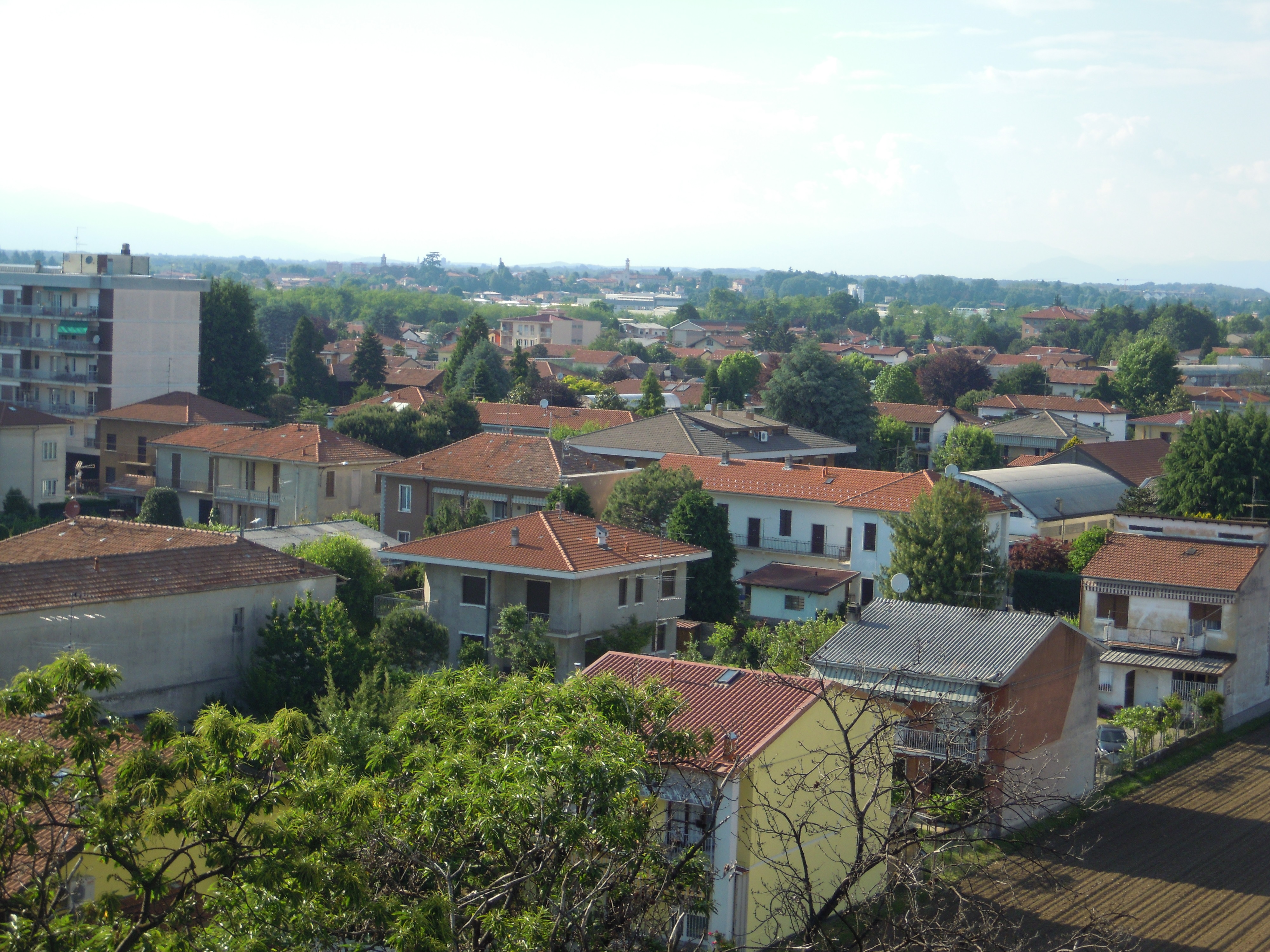 Vista di Samarate (VA) da Villa Ricci al Montevecchio